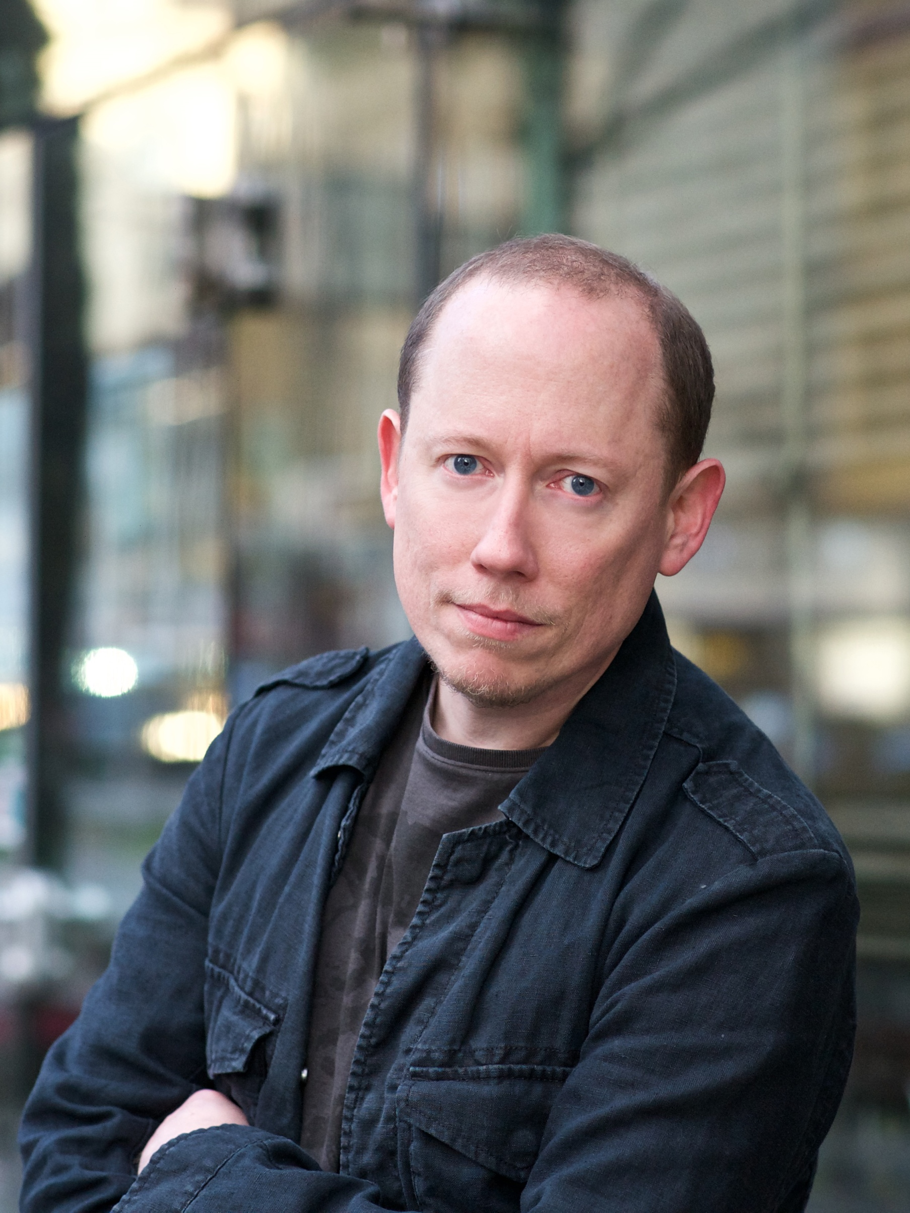 Authorisiertes Autorenfoto von Klaus Oppitz , cropped version of File:Klaus Oppitz, Autorenfoto.jpg